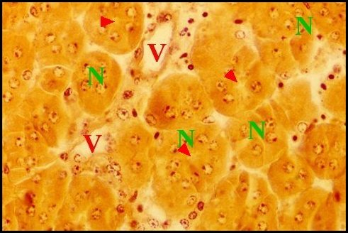 Détails (cellules) du tissu endocrinoïde de Mastophora cornigera, femelle adulte.